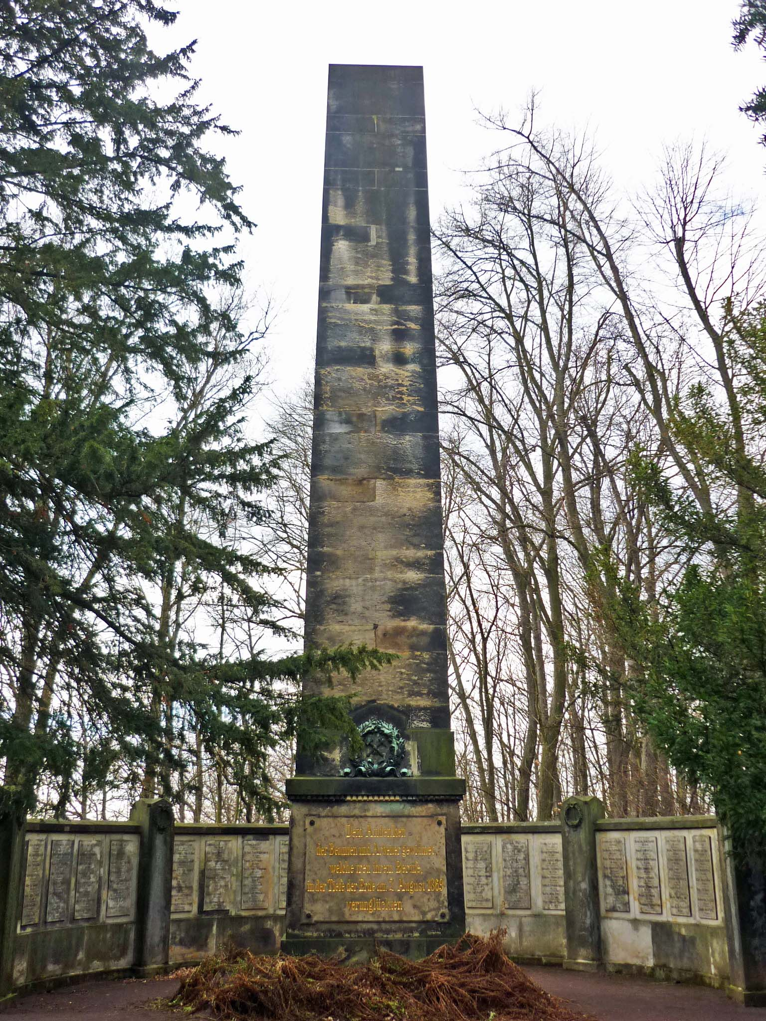 Denkmal für die Opfer des Grubenunglücks im Segen-Gottes-Schacht und Neuhoffnung-Schacht im Jahr 1869